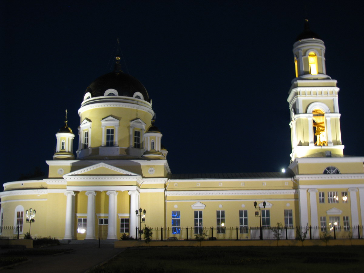 Свято-троицкий кафедральный собор (Рязановская церковь) в Екатеринбурге ночью